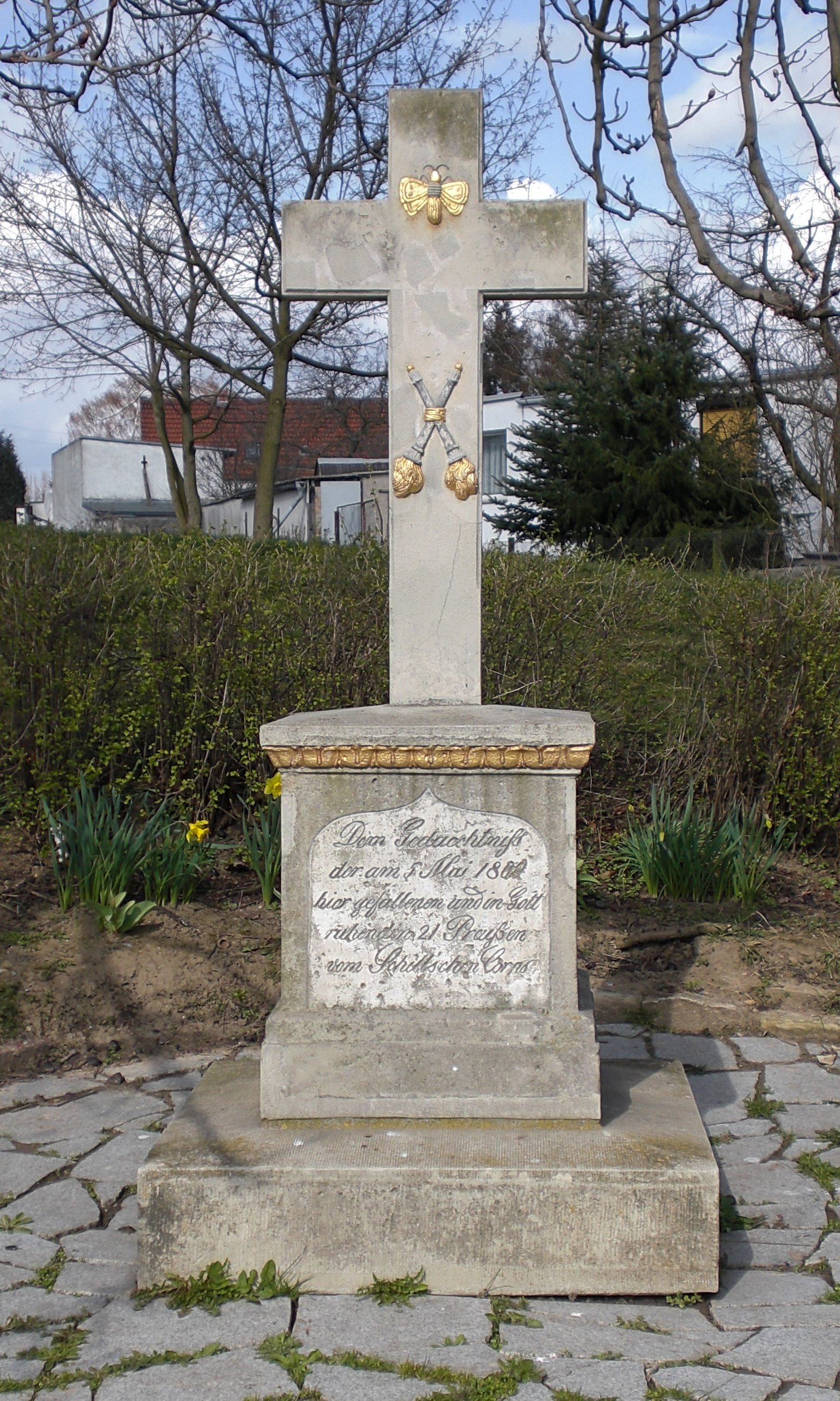 Schill-Denkmal in Dodendorf, Sachsen-Anhalt, erinnert an die Schlacht bei Dodendorf vom 5. Mai 1809